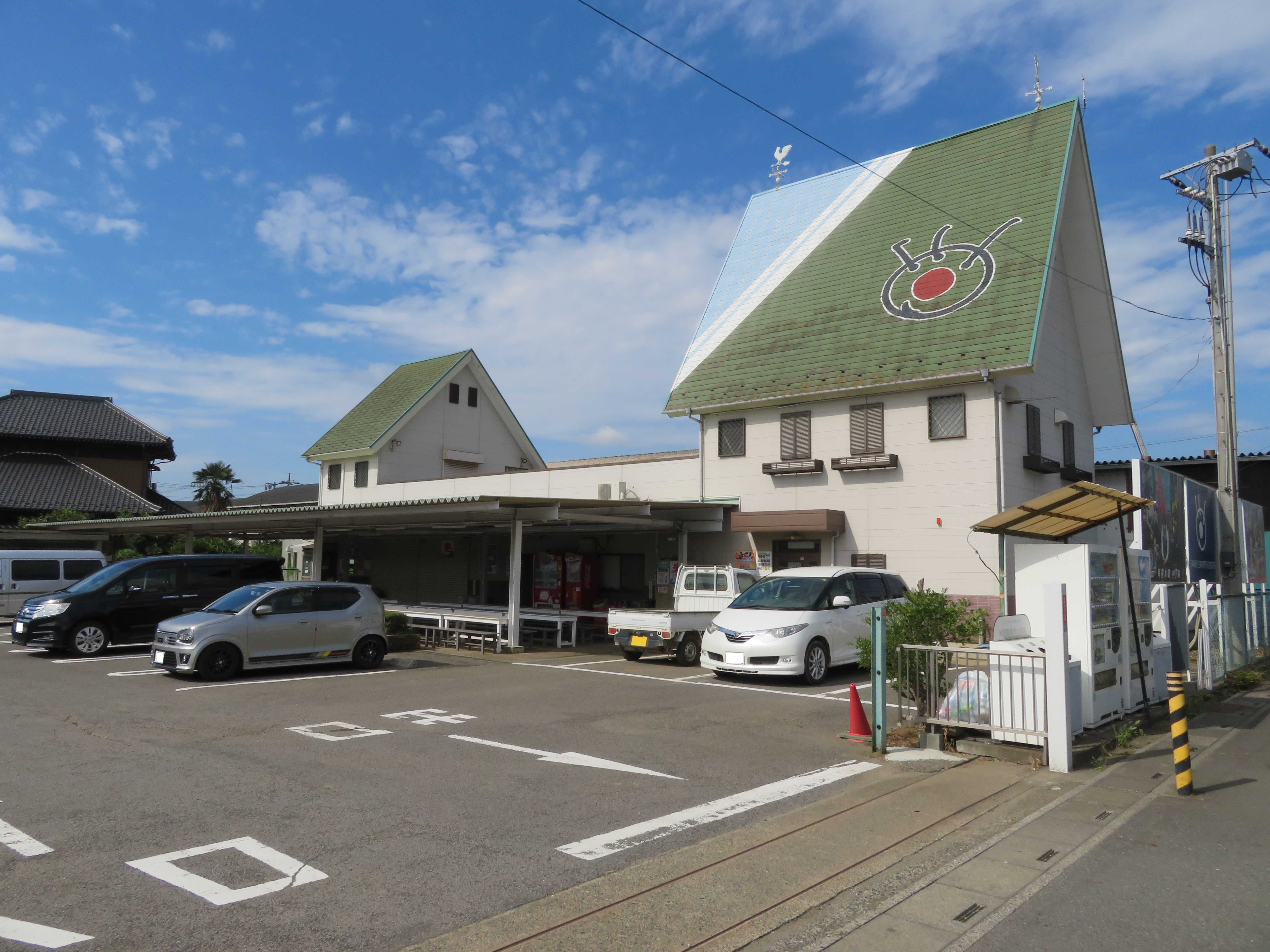 埼玉県三郷市に所在するサンケイスポーツセンター Canon PowerShot SX720 HS